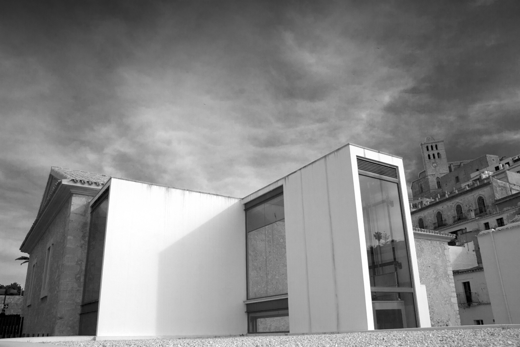 Museu d'Art Contemporani d'Eivissa (MACE), Canon EOS 30D, Sigma 18-200mm F3.5-6.3 DC, 23 de març del 2012.